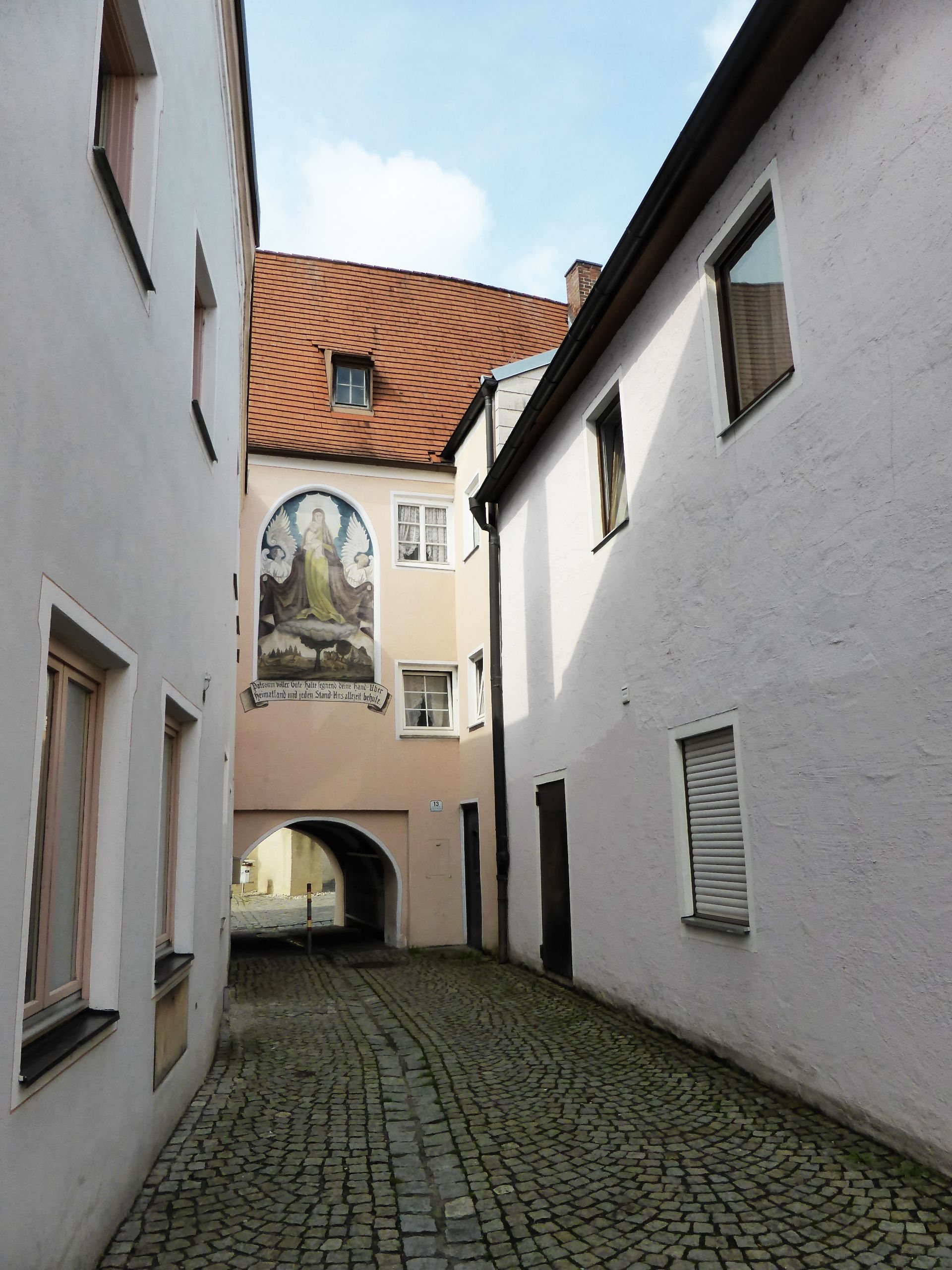 Glaserhaus